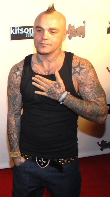 Singer Shifty Shellshock